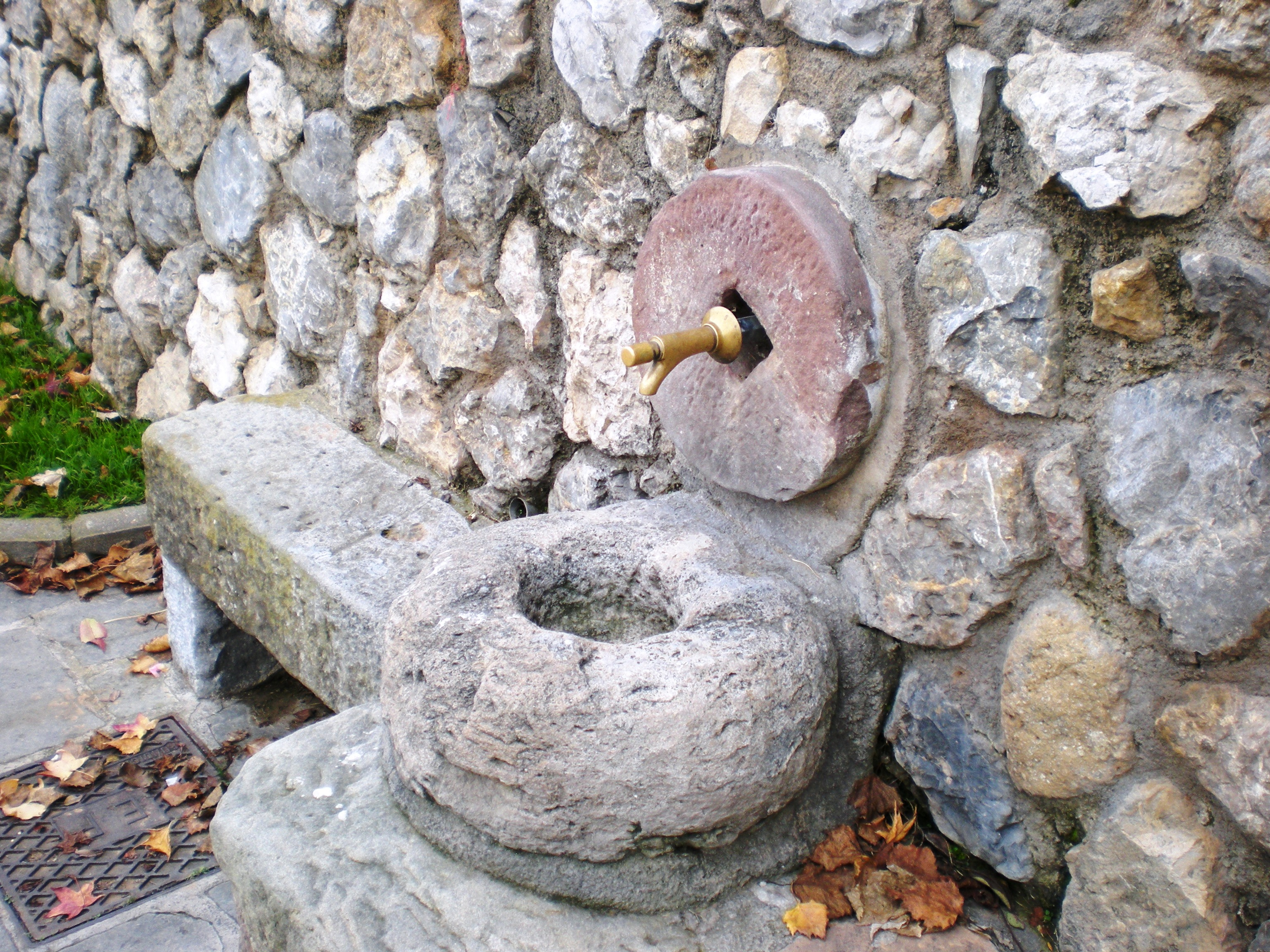 Font de la plaça del Mur. Sant Llorenç de Morunys (Solsonès)